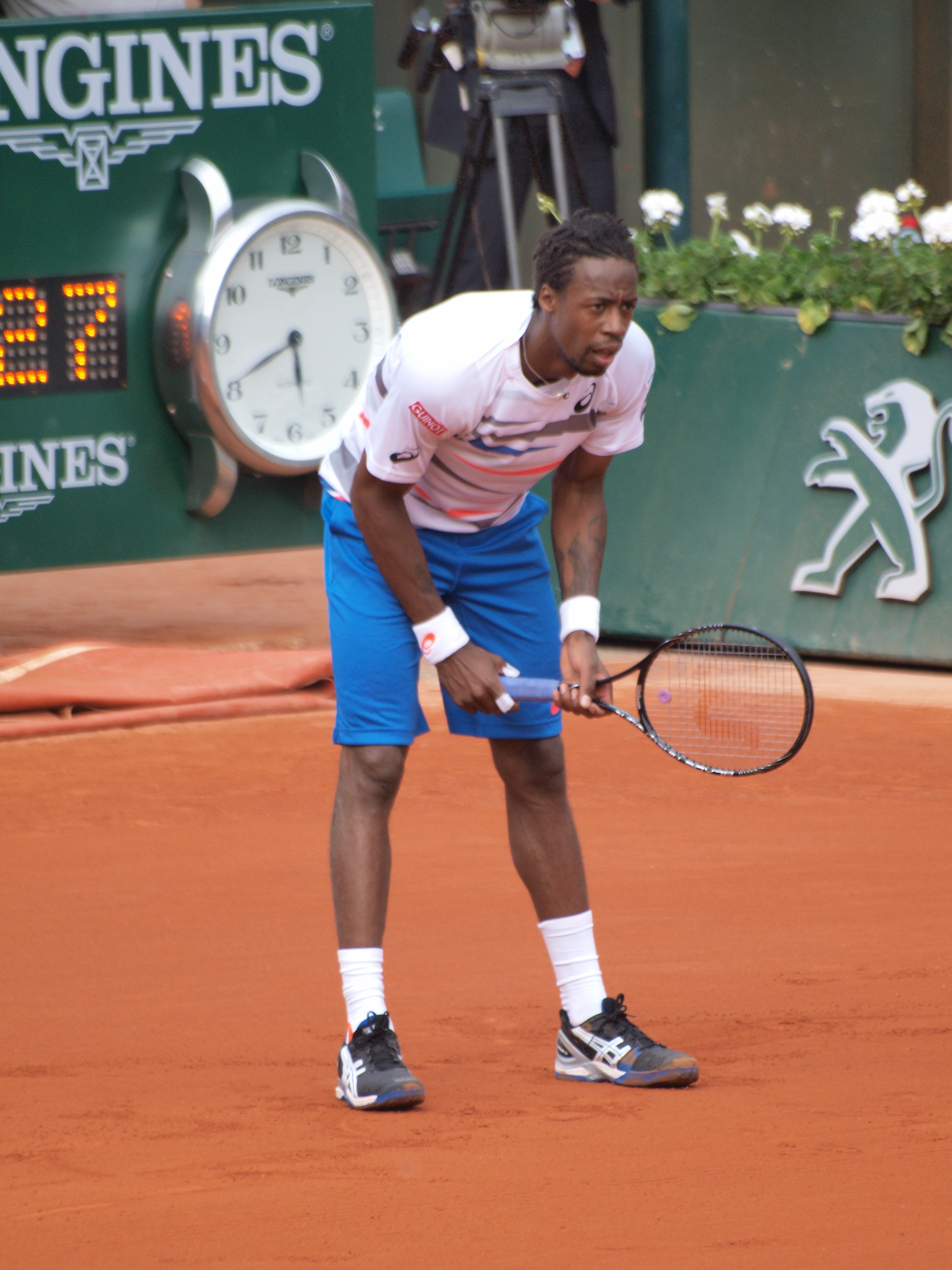 Internationaux de France de tennis, le 2 juin 2014, sur le court Philippe Chatrier : Gaël Monfils